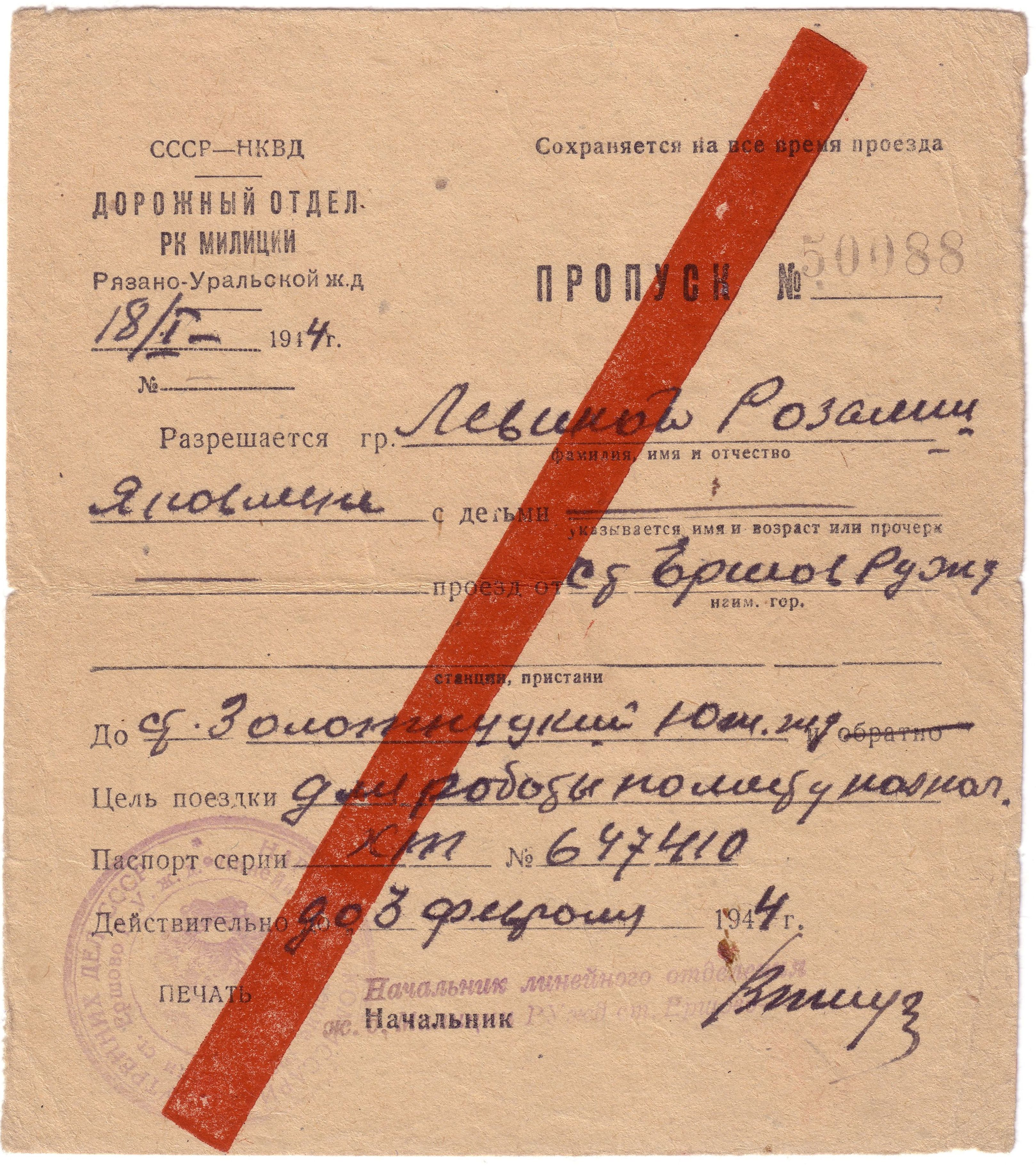 НКВД СССР. Дорожный отдел рабоче-крестьянской милиции на станции Ершов (станция) Саратовской области Рязано-Уральской железной дороги. Пропуск для следования из эвакуации в освобождённую Харьковскую область (Южная железная дорога). Документ действителен с 18 января по 3 февраля 1944 года.